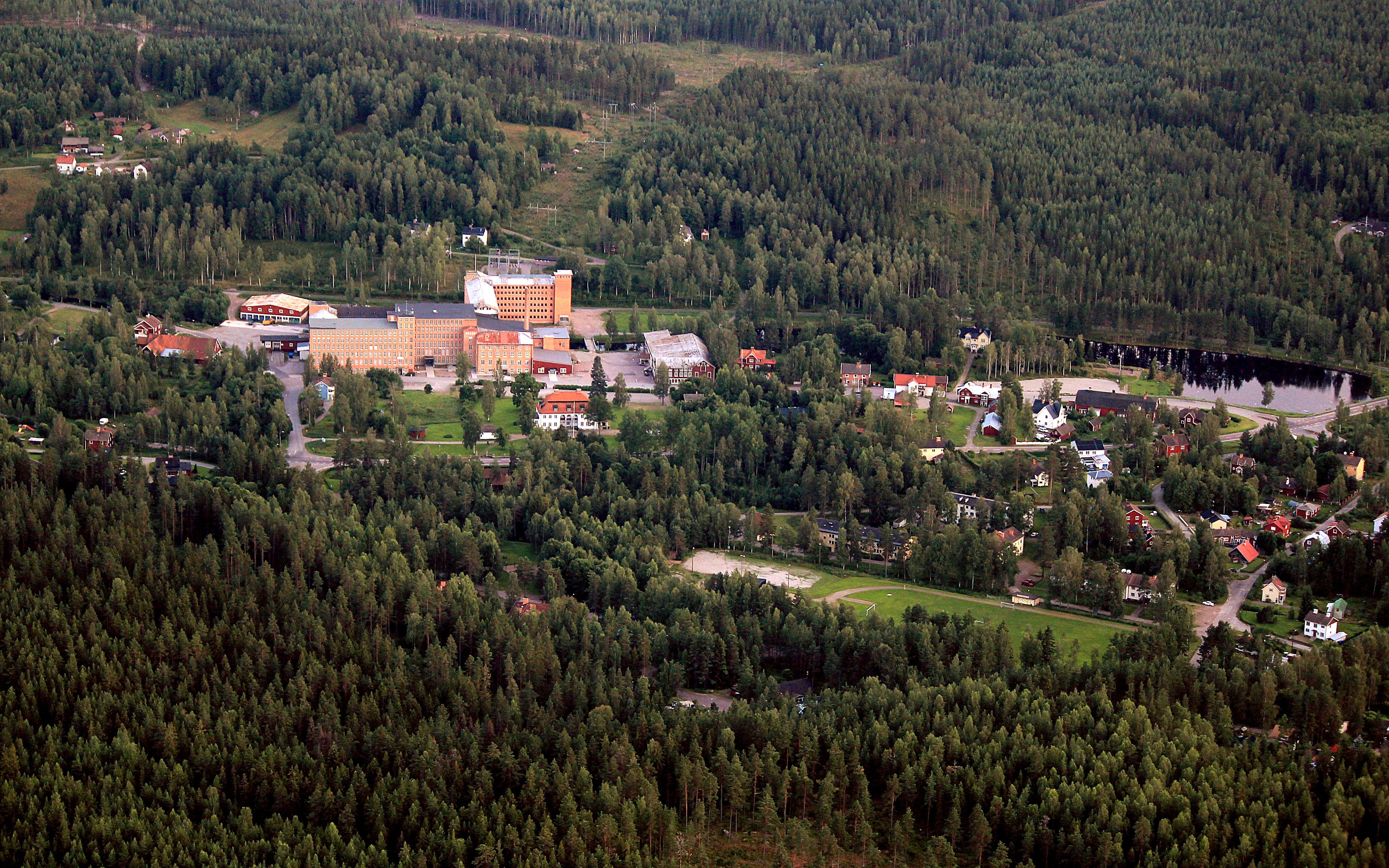 Flygfoto över Sågmyra, Falu kommun, Dalarnas län, Sverige. F.d. yllefabriken t.v. This aerial photograph has been approved for publishing by the Swedish Armed Forces with the ID: FMTM 10 830:11043 This tag does not indicate the copyright status of the attached work. A normal copyright tag is still required. See Commons:Licensing for more information.